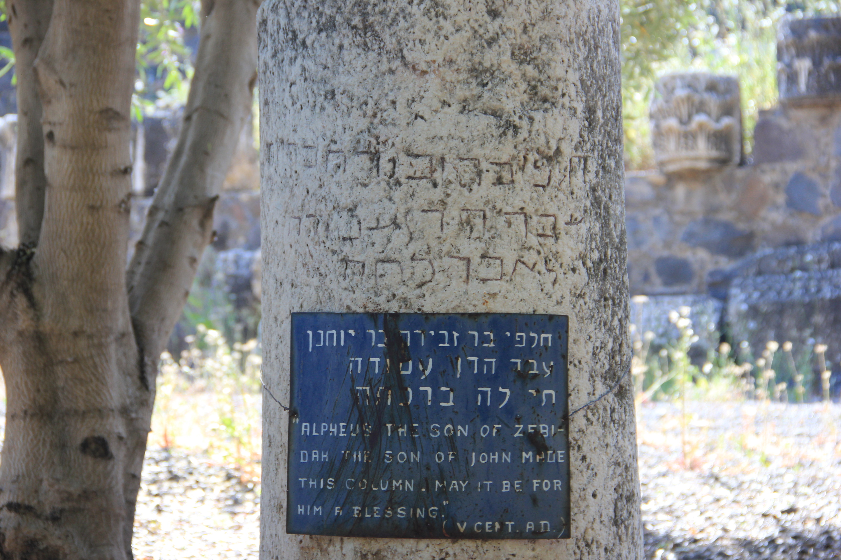 kfar nahum